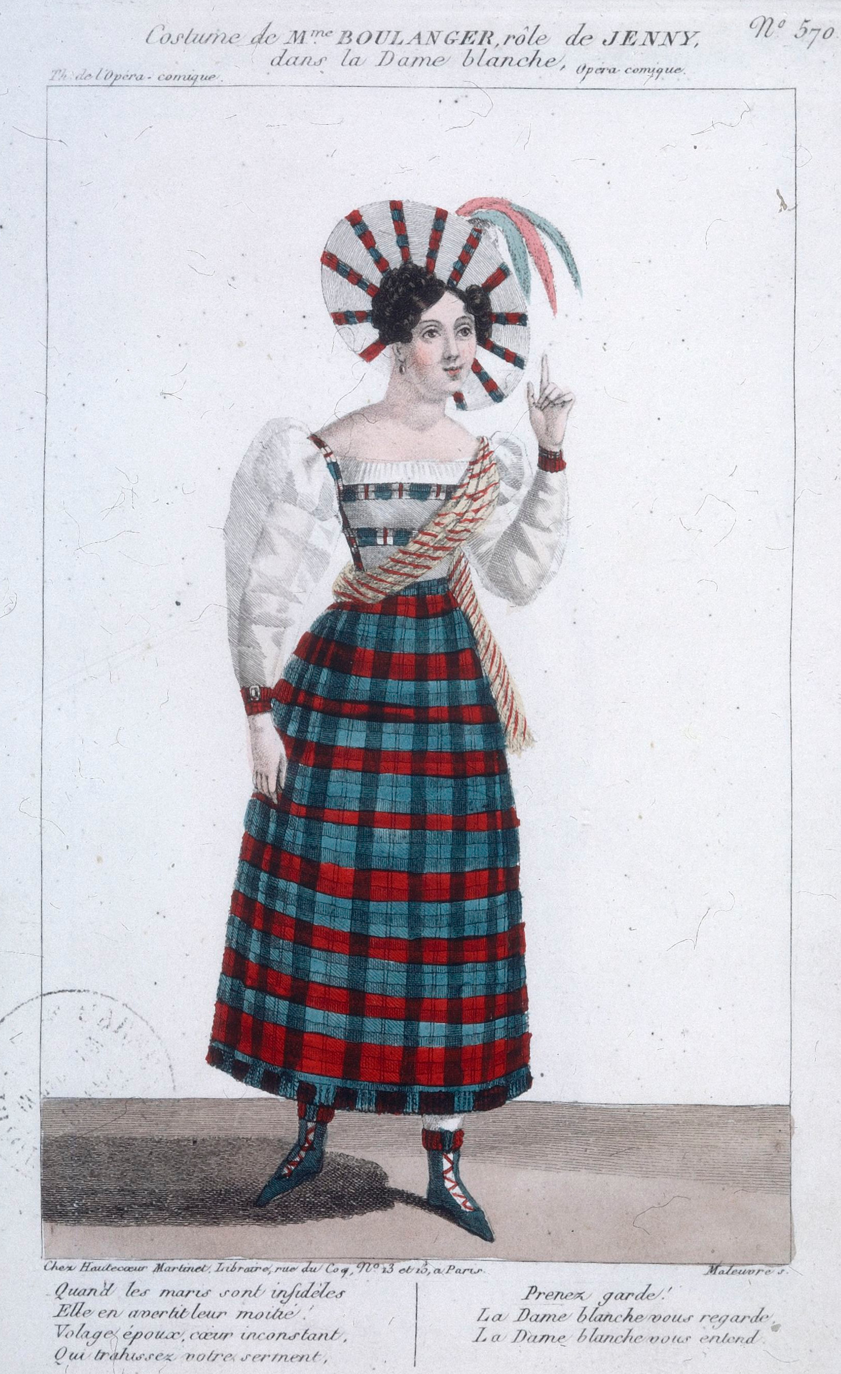 Costume de Mme Boulanger (rôle de Jenny) dans La Dame blanche de François Adrien Boieldieu